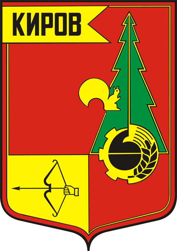 Wapen van de Russische stad Kirov }